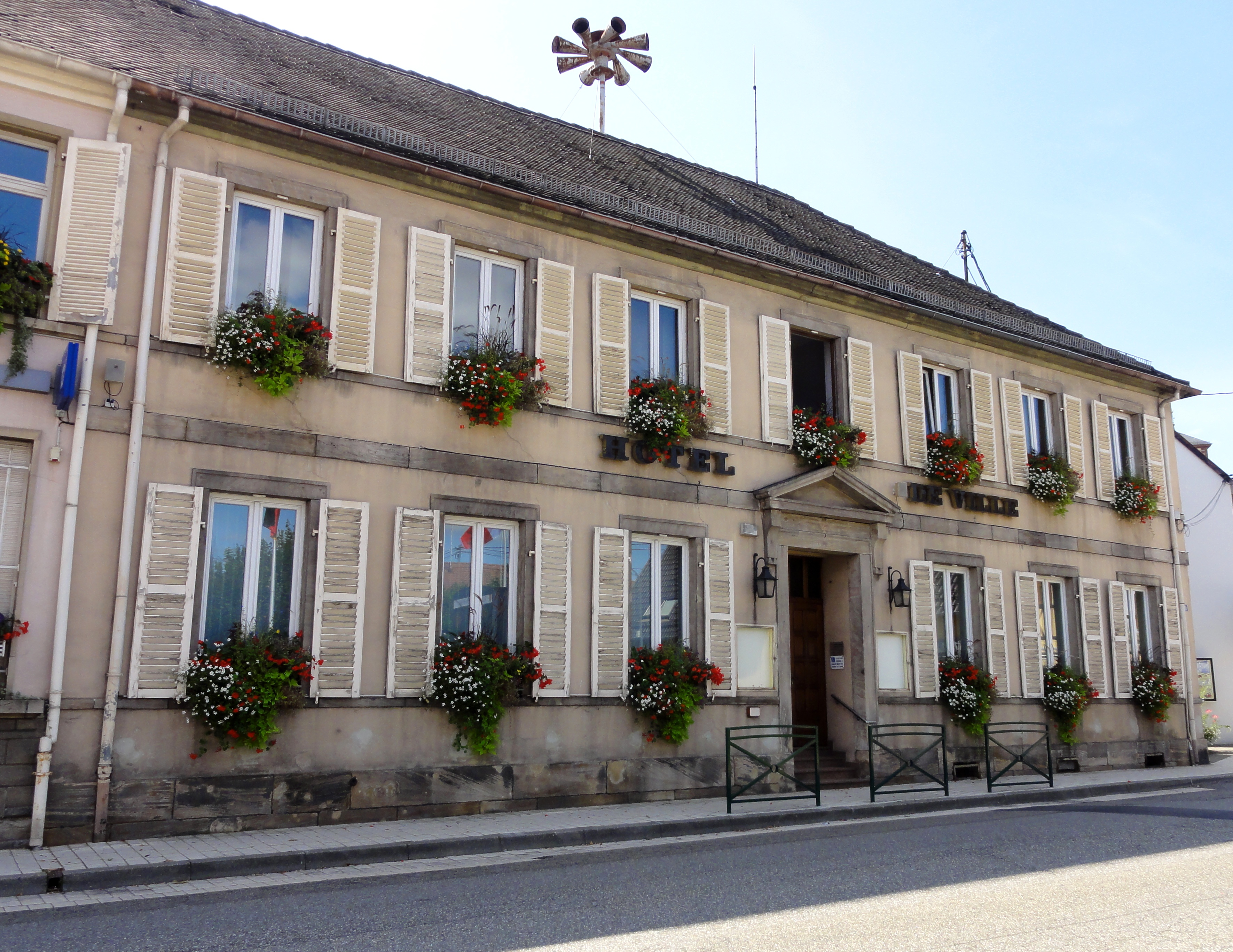 Alsace, Bas-Rhin, Soufflenheim, Mairie (1823), Grand'Rue. .